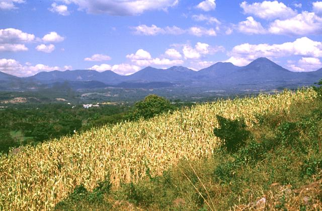 Cordillera de Apaneca mountain range in El Salvador.